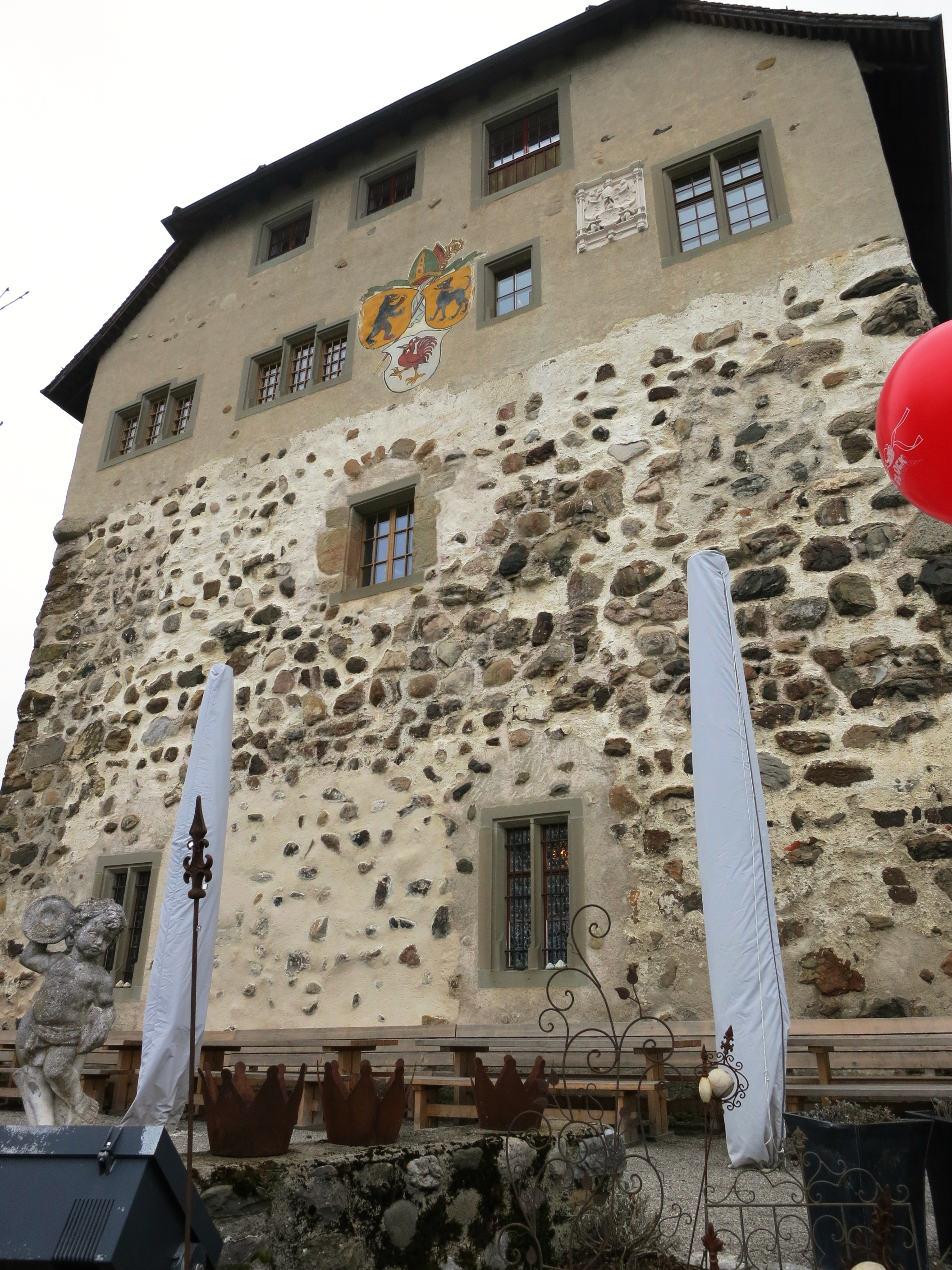 Schloss Oberberg, Gossau SG, Schweiz